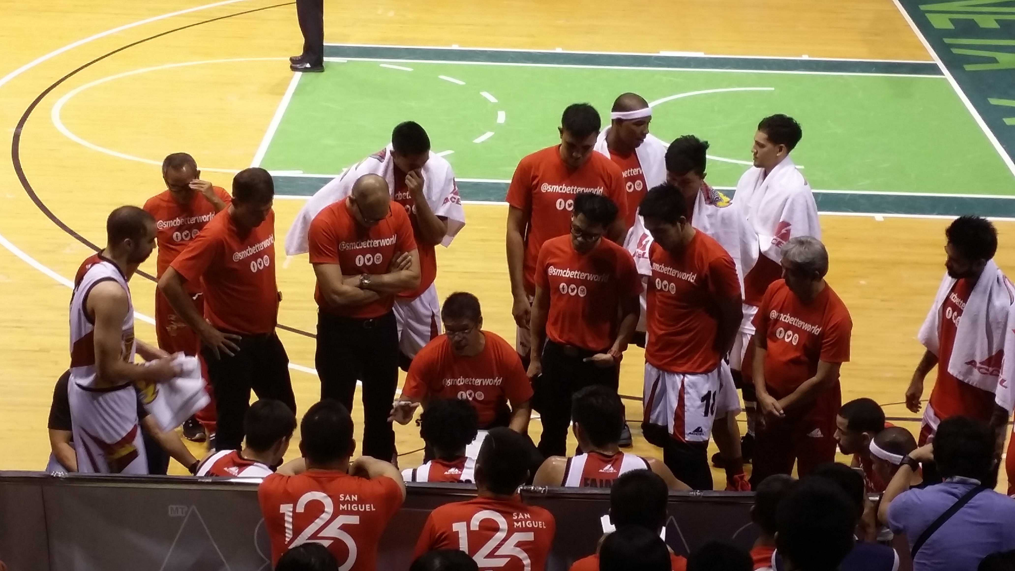 San Miguel Beermen huddle - 2015-1209